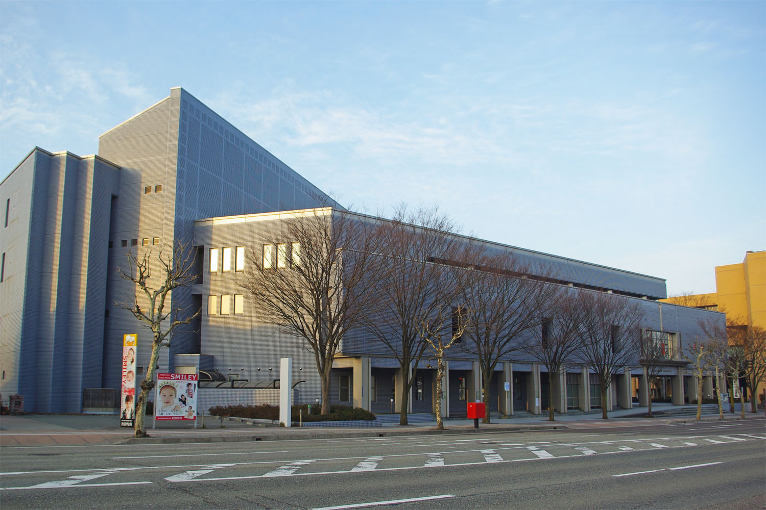 秋田県立図書館（秋田市山王新町）